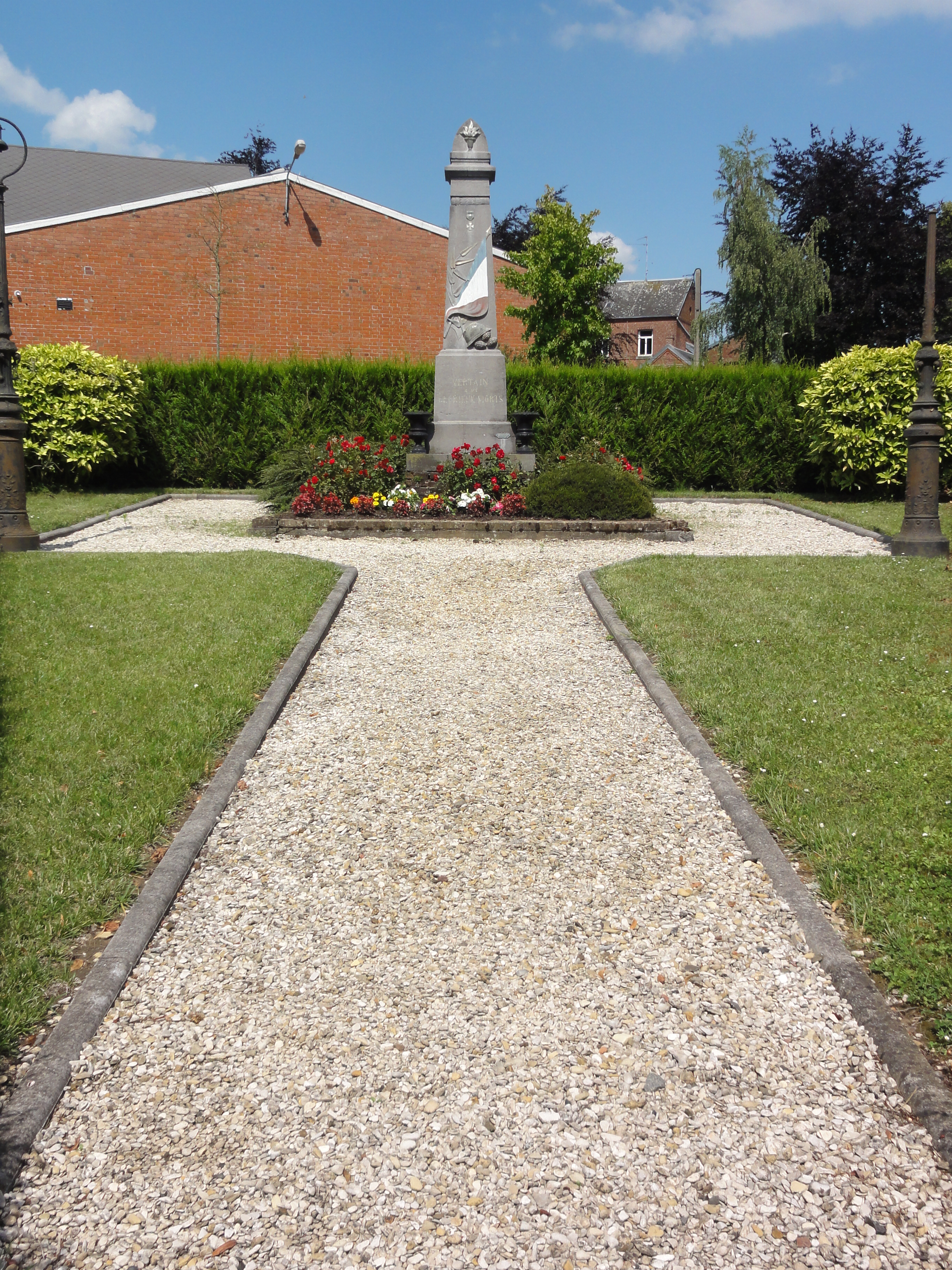 Vertain (Nord, Fr) monument aux morts.